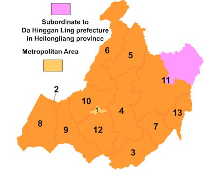 Prefectura de Hulunbuir detalhs 12 Bandièra Autonòma Evenca 1 Hailar District 1,440 km2 County-Level Cities 2 Manzhouli City 696 km2 3 Zhalantun City 16,800 km2 4 Yakeshi City 27,590 km2 5 Genhe City 19,659 km2 7 Arun Banner 12,063 km2 8 New Barag Right Banner 25,102 km2 9 New Barag Left Banner 22,000 km2 10 Old Barag Banner 21,192 km2 Autonomous Banners 11 Oroqin Autonomous Banner 59,800 km2 12 Evenk Autonomous Banner 19,111 km2 13 Morin Dawa Daur Autonomous Banner 10,500 km2